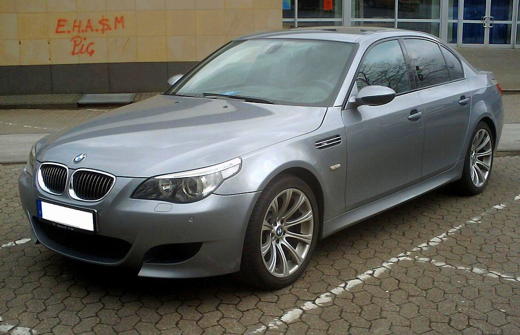 BMW M5